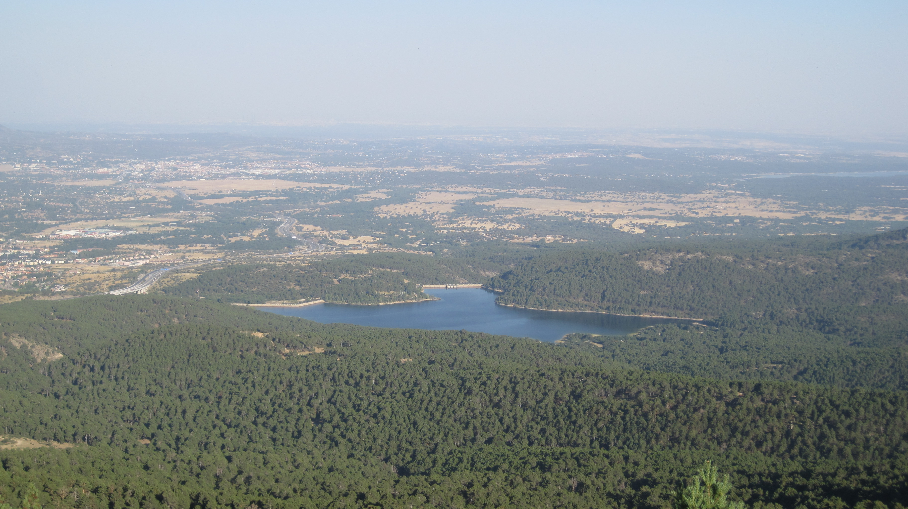 Vista general del embalse de La Jarosa, en Guadarrama (Madrid, España).